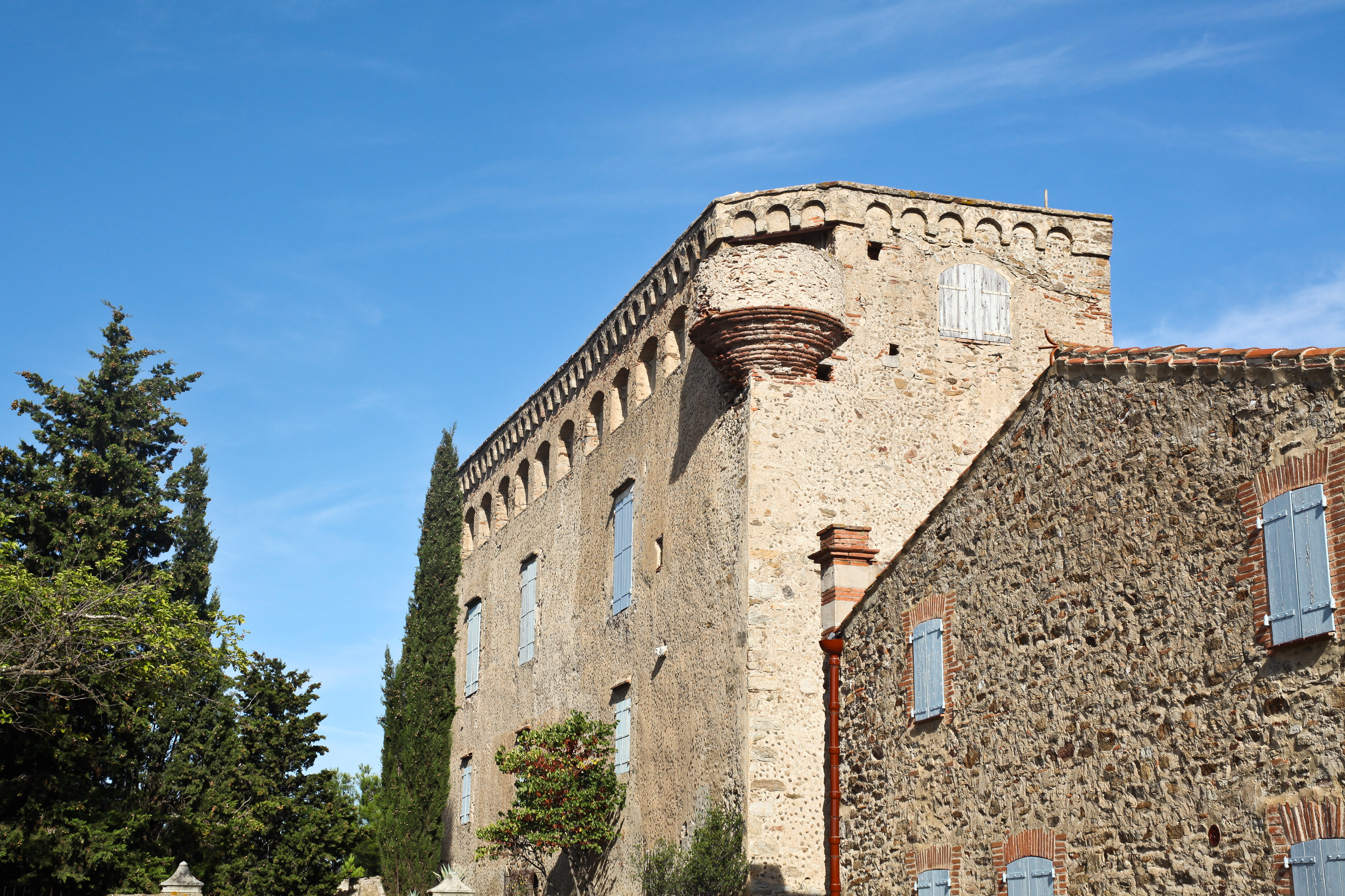 Château de Cuxous, Cassagnes .